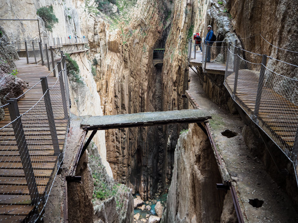 El Caminito del Rey